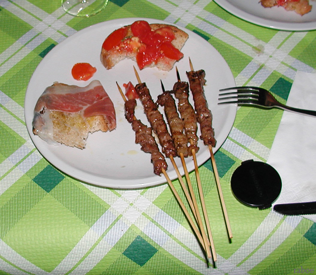 Arrosticini